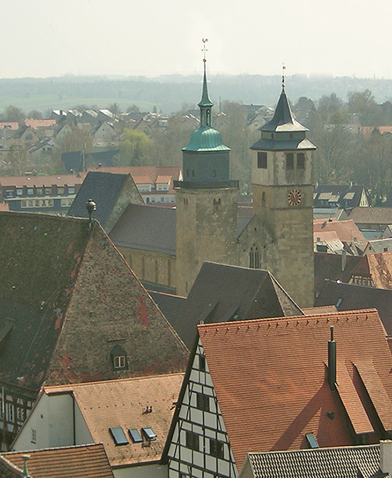 Barholomäuskirche Markgröningen vom Oberen Torturm